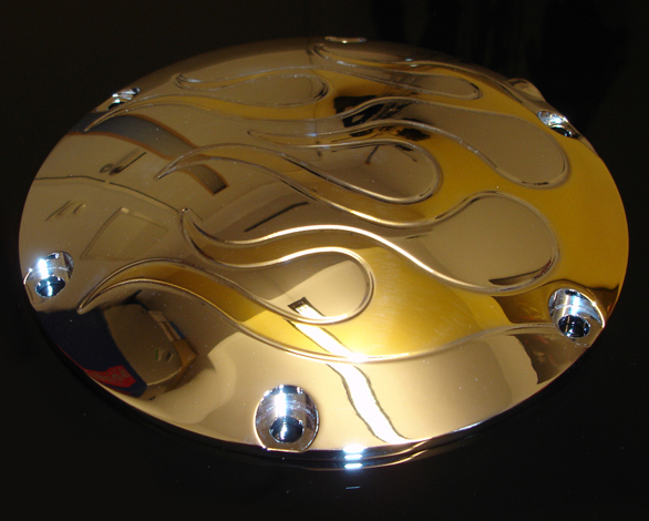 Ein Getriebedeckel der via Tampongalvanik mit 24ct Feingold verziert wurde.